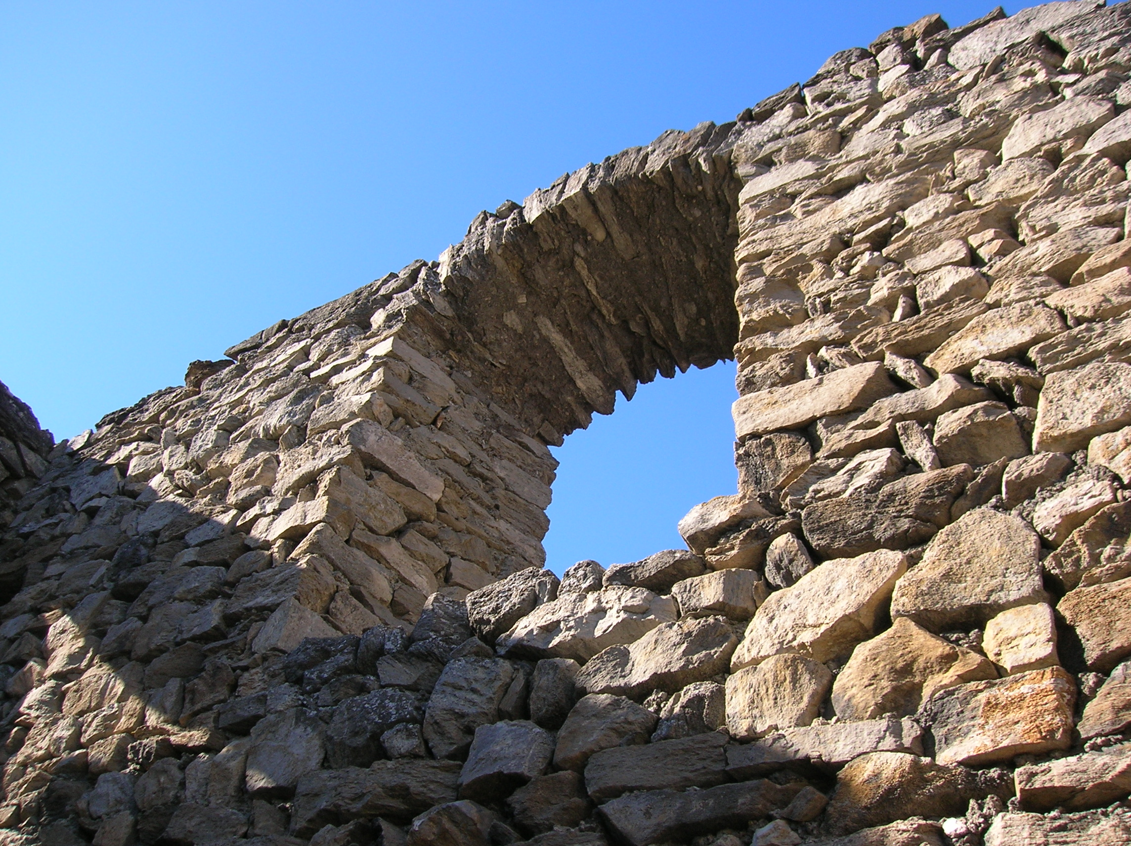 Torre dei Salassi in inverno, a Jovençan, Valle d'Aosta, Italia.